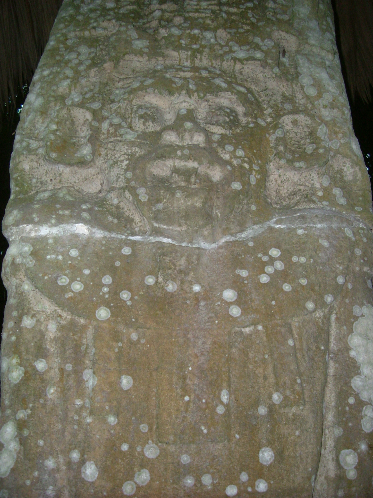 Seibal stele 18.10.2006